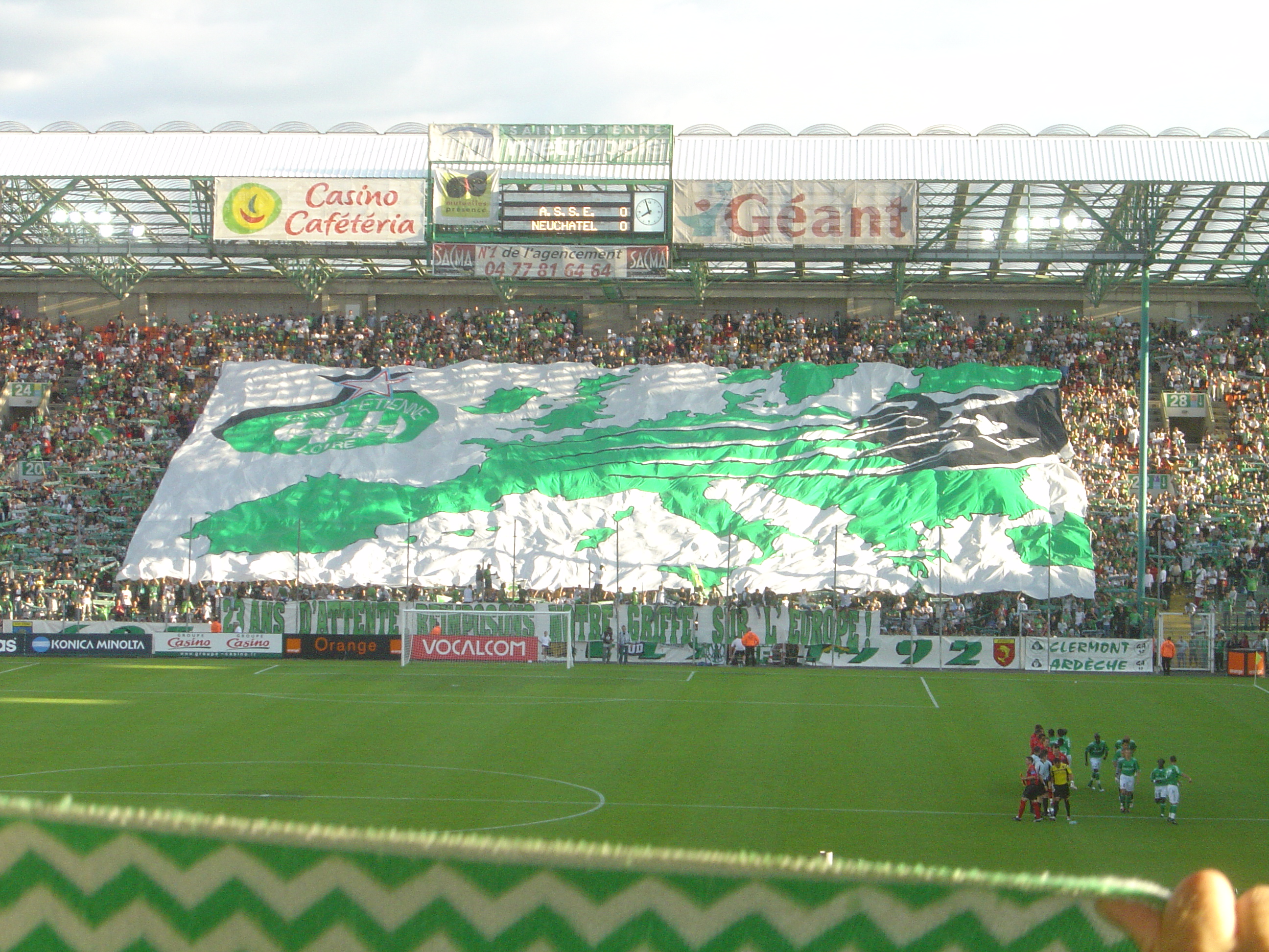 Photo du tifo de football du Stade Geoffroy Guichard réalisé lors de la saison 2005-2006 pour la venue des suisses du Neuchâtel Xamax FC au chaudron le 2 juillet 2005 (1-1). On peut ainsi voir une carte de l'europe avec la griffe d'une panthère étendue sur le Kop Sud (Tribune Jean Snella). Cette photo a été prise par Mickaël Roure alias Altrensa pour Wikipédia le 2 juillet 2005. Elle ne saurait être utilisée sans la mention de son auteur. D'avance merci. Licensing Catégorie:Image de l'ASSE